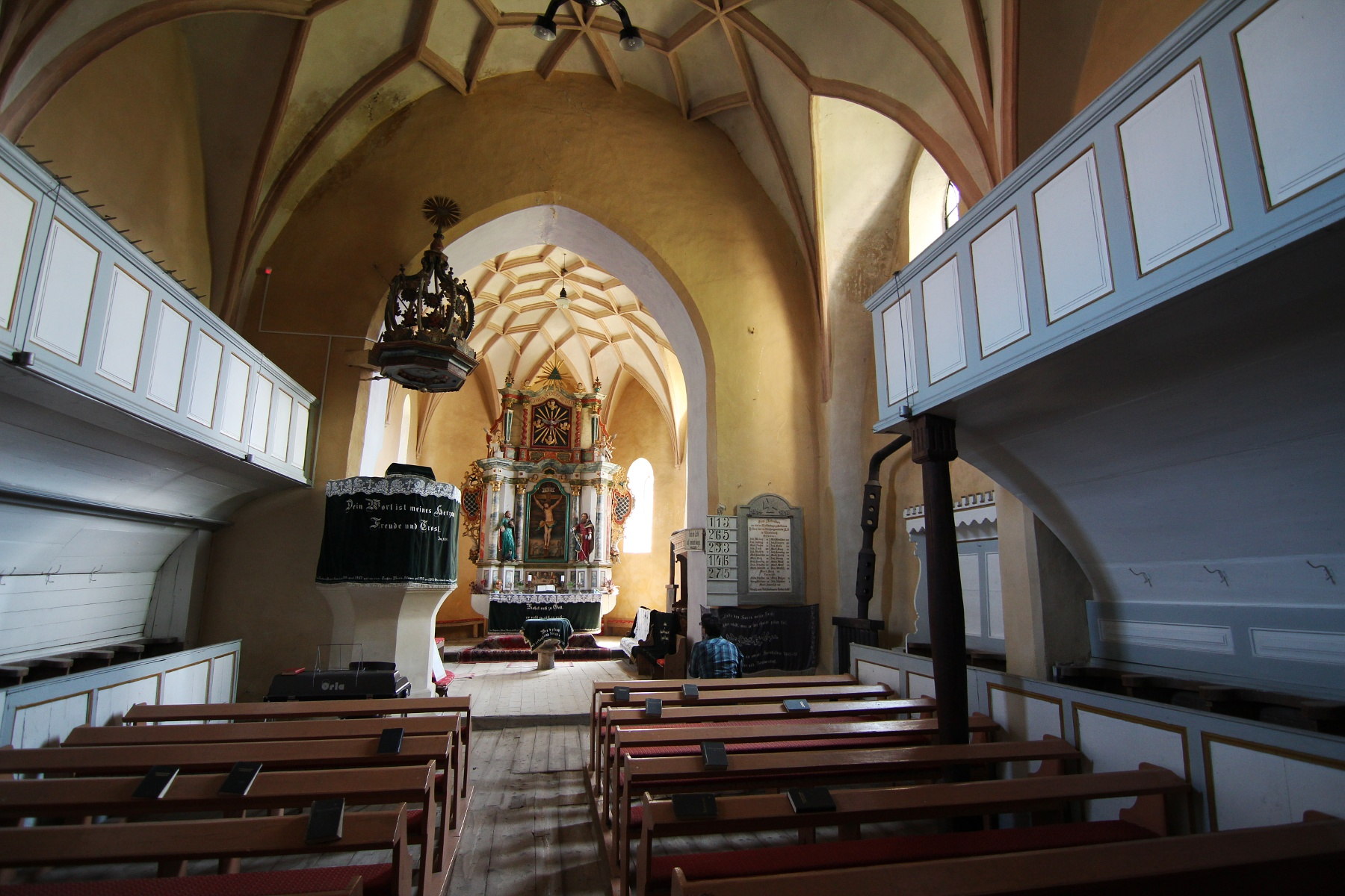 Valea Viilor:Biserica evanghelică 01